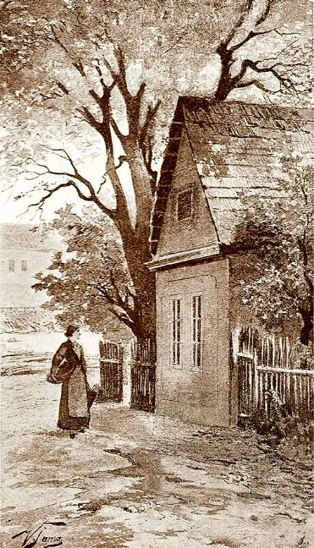 rodný dům Prokopa Chocholouška v Sedlci (1890) Ottovy vlastivědné edice Čechy, díl VIII.: Táborsko, str. 67, Praha 1892